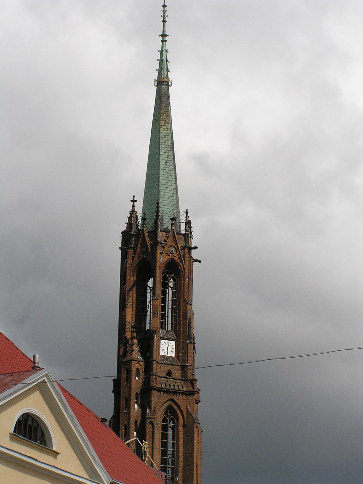 Bielawa